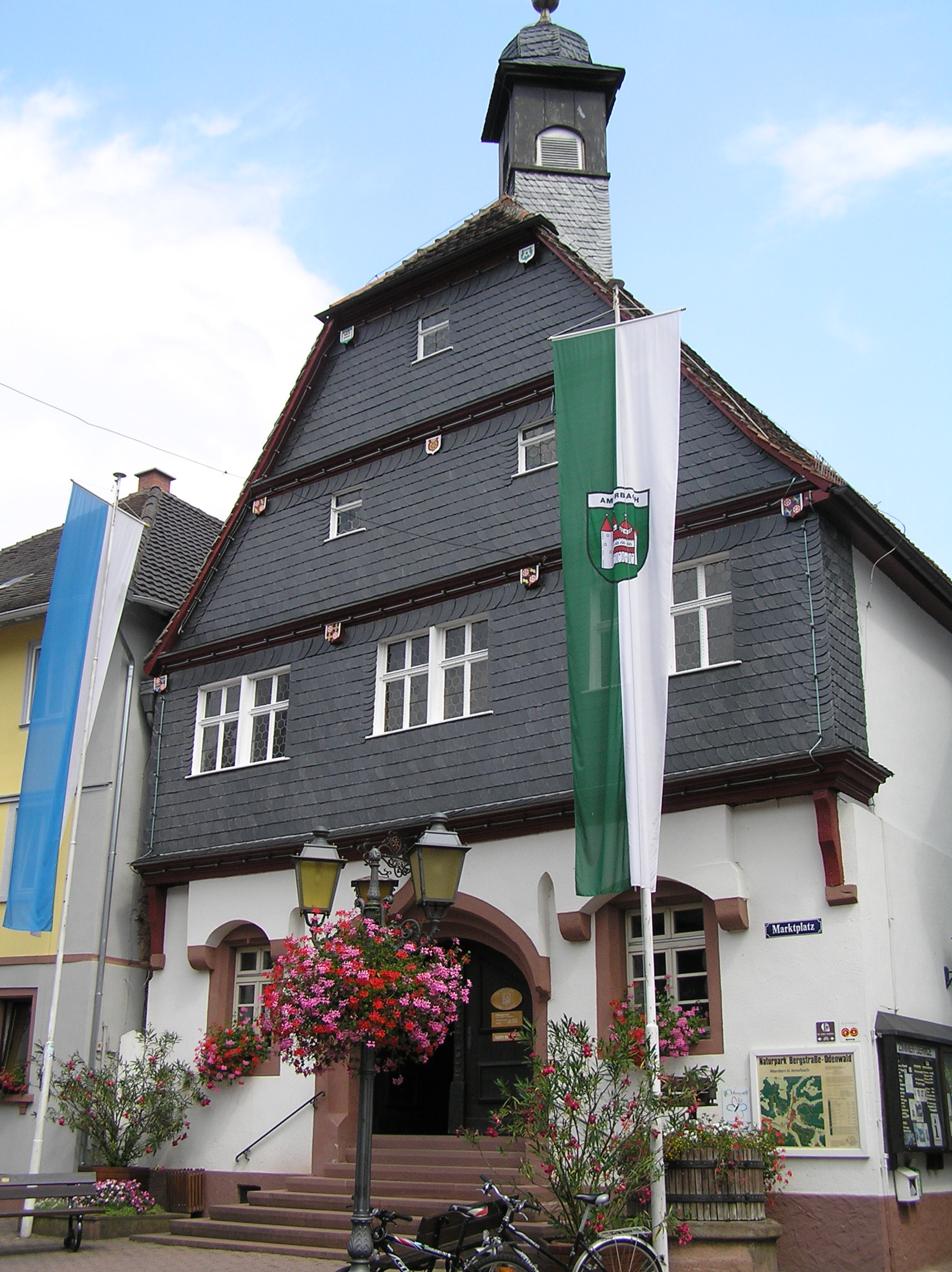 Das Amorbacher Rathaus am Marktplatz